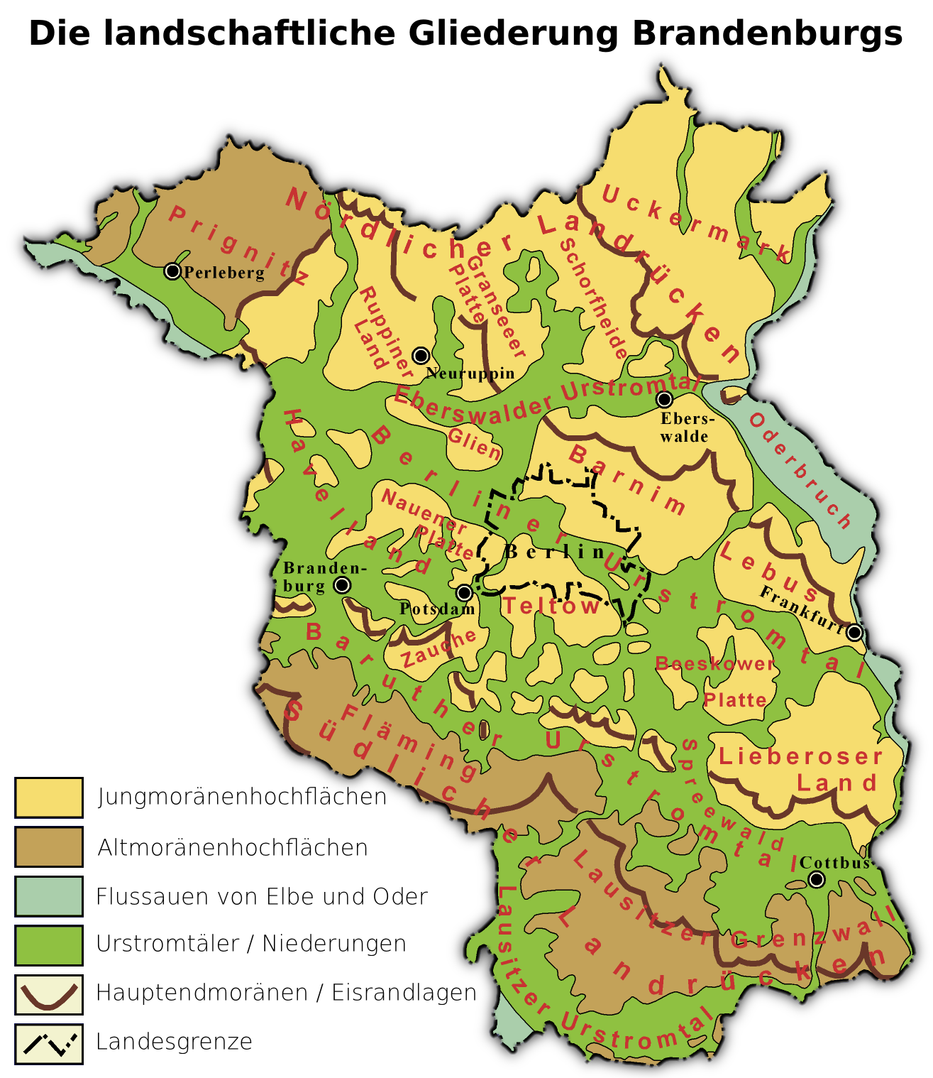 Die landschaftliche Gliederung Brandenburgs. Daten stammen aus: Atlas zur Geologie von Brandenburg, Werner Stackebrandt und Volker Manhenke (Hrsg.), Landesamt für Geowissenschaften und Rohstoffe Brandenburg (heute Landesamt für Bergbau, Geologie und Rohstoffe Brandenburg, LBGR) 2002, 2. Aufl., 142 S., 43 Karten, ISBN 3-9808157-0-6